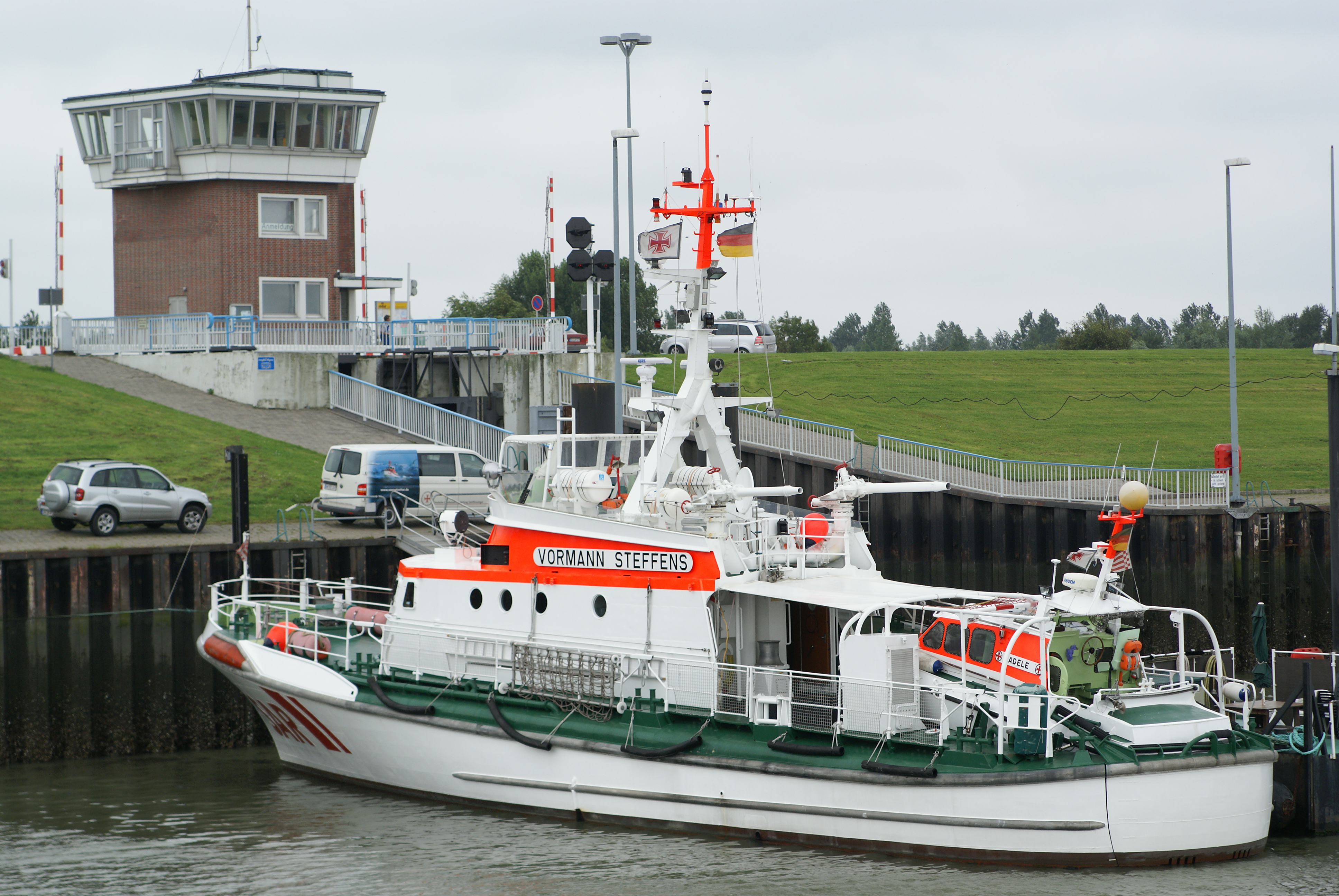 SK Vormann Steffens am Anleger in Hooksiel